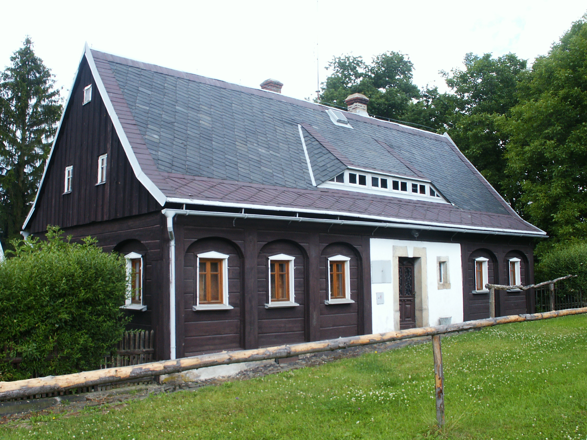 Světlík - č.p. 45